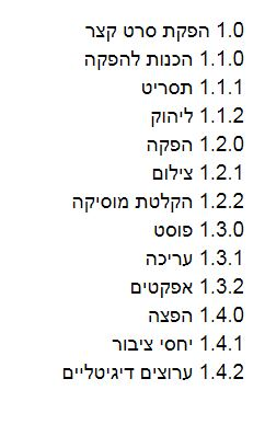 WBS במבנה טקסט